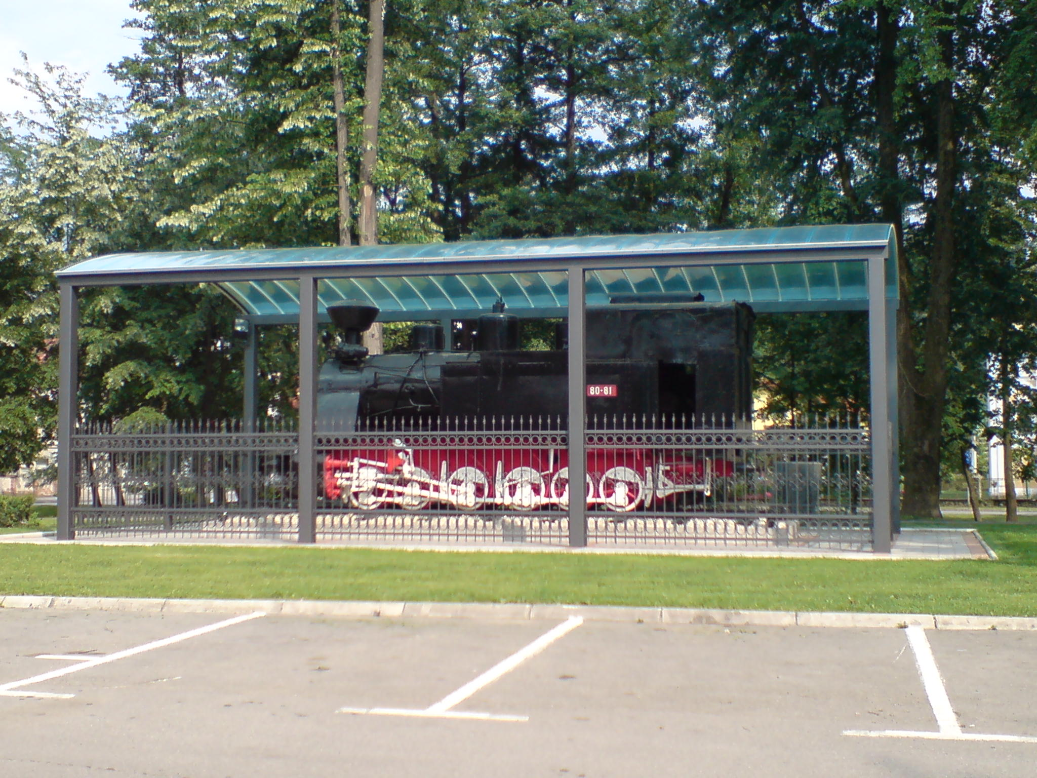 Lokomotiva Ćiro u Orahovici